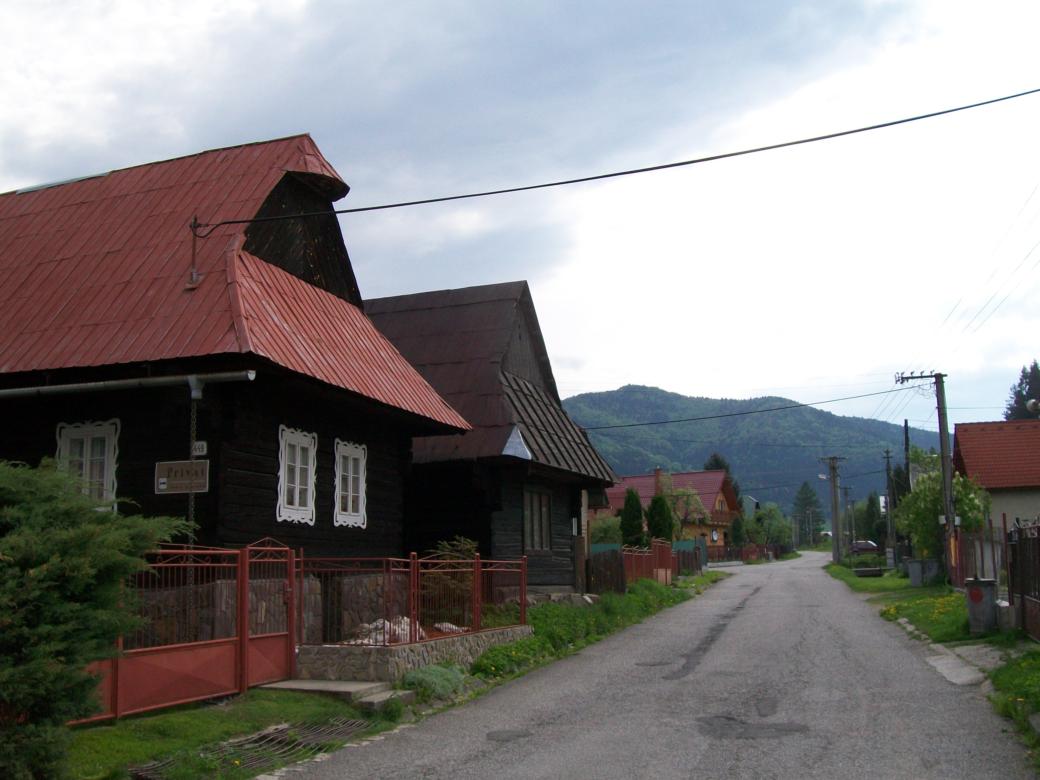 Malebné drevenice v obci Liptovská Osada